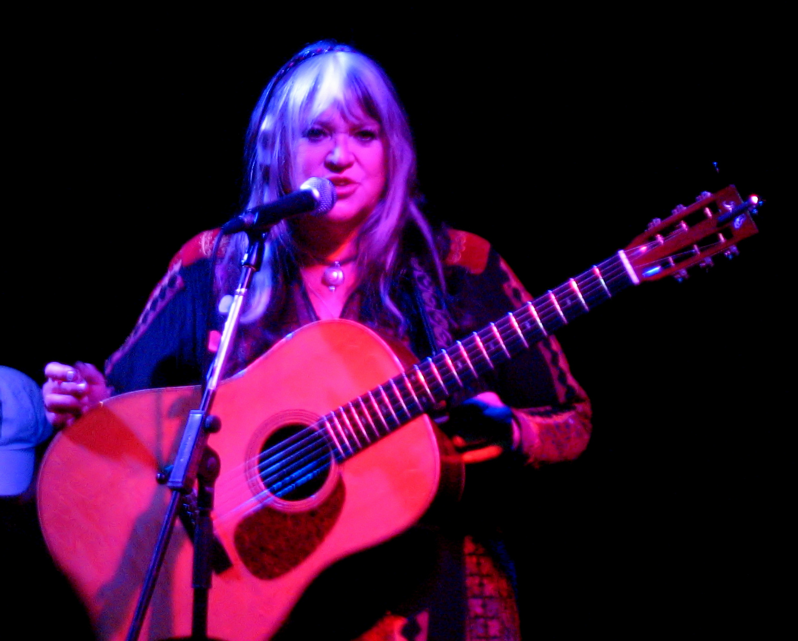 Sängerin Melanie Safka im Metropolis in München 2009